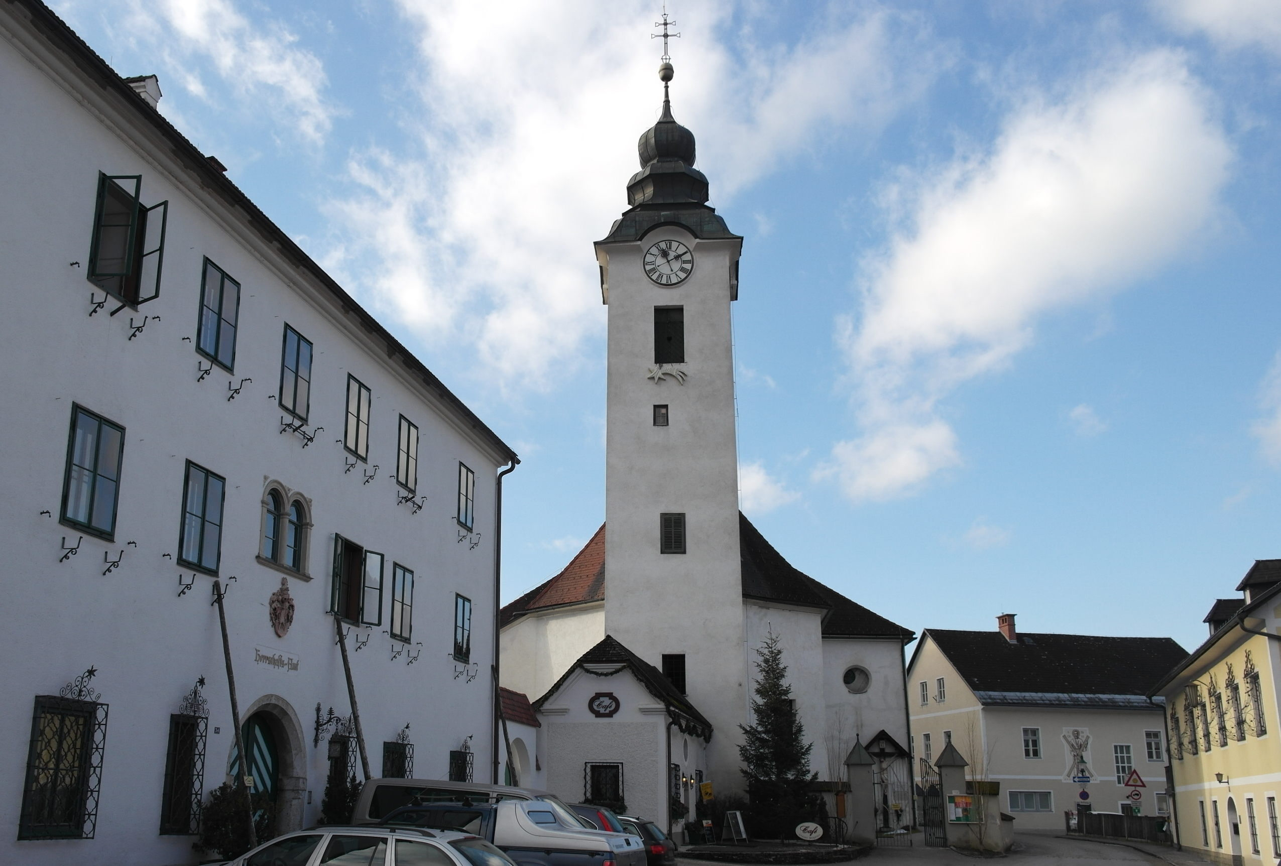 Katholische Pfarrkirche zum Heiligen Andreas Öblarn, Ansicht von Osten